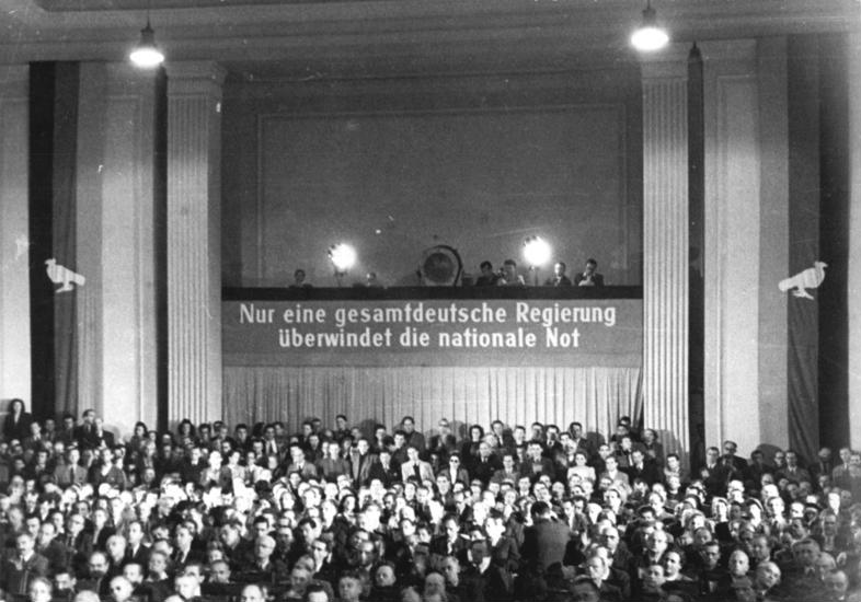 Zentralbild/ Gründung der Deutschen Demokratischen Republik am 7.10.1949 Im Gebäude der DWK (Deutsche Wirtschaftskommission) in der Leipziger Straße in Berlin fand am 7.10.1949 eine Sitzung statt, auf deren Tagesordnung ein Manifest der Nationalen Front des demokratischen Deutschland die Stellungsnahme zur politischen Lage und Beratung der zu ergreifenden Maßnahmen standen. UBz: einen Überblick über die 9. Sitzung des Volksrates, der sich unter Vorsitz von Wilhelm Pieck zur Provisorischen Volkskammer umbildet.